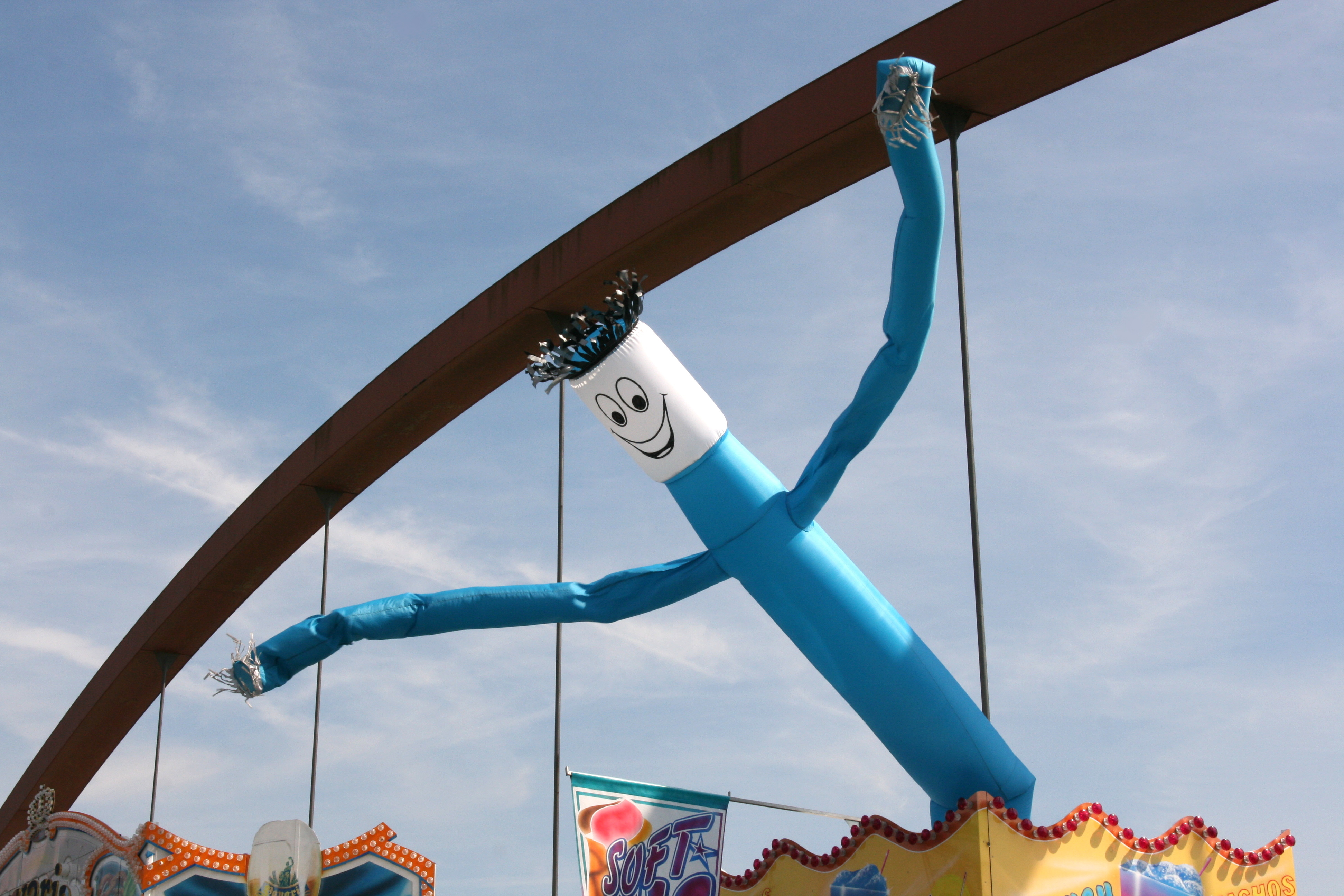 Hafenbrücke (Hafenstraße) über den Dortmund-Ems-Kanal beim Kanalfestival 2011 in Datteln